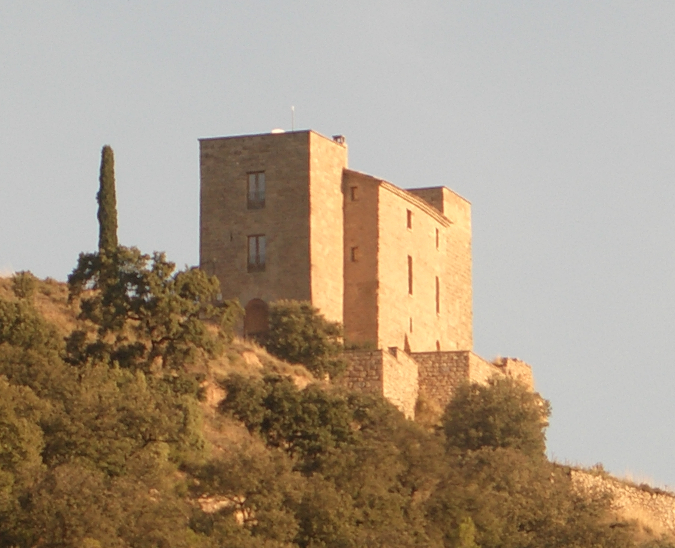 Castell de Besora, Solsona, Catalunya